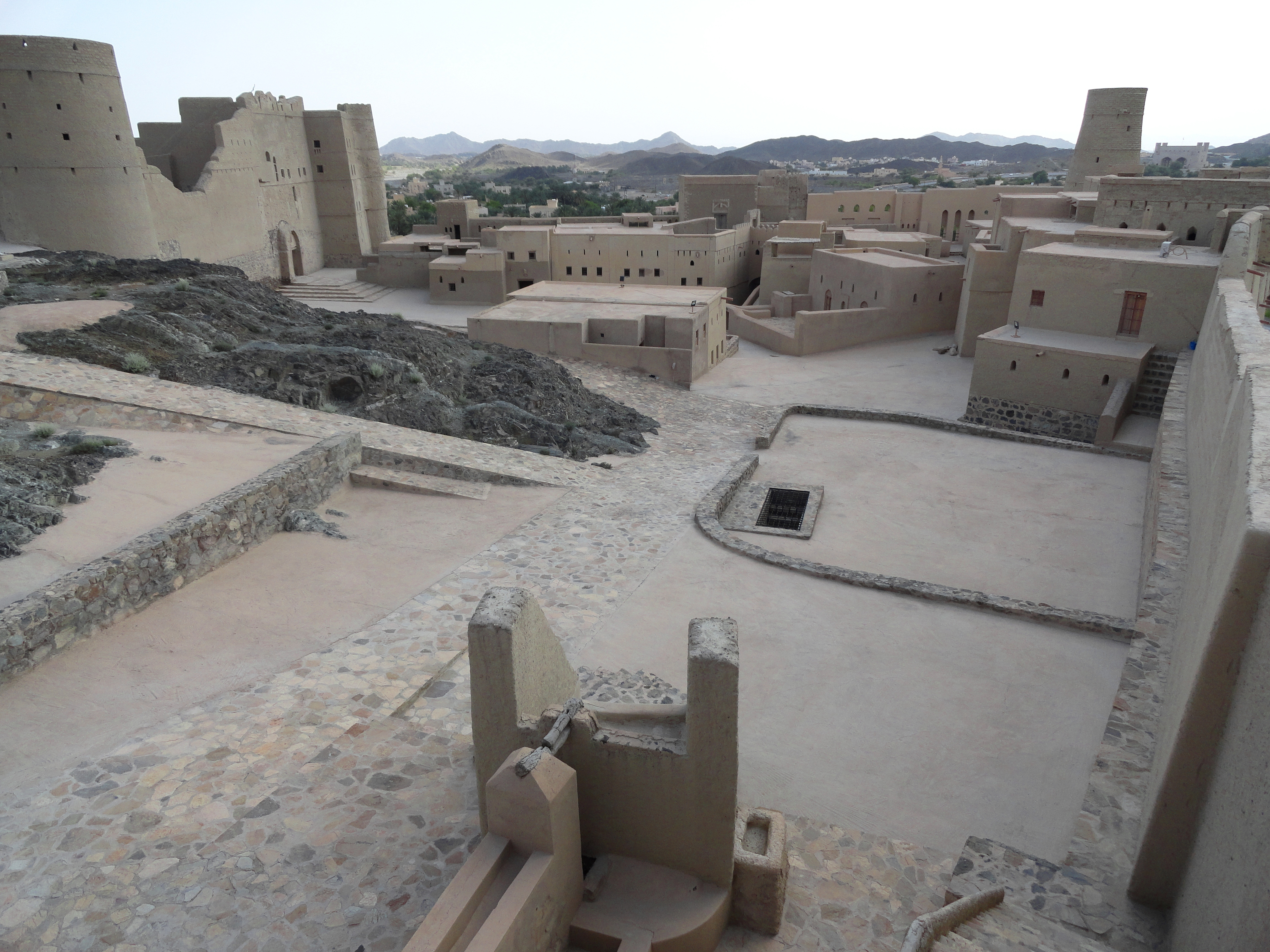 Bahla, Oman.